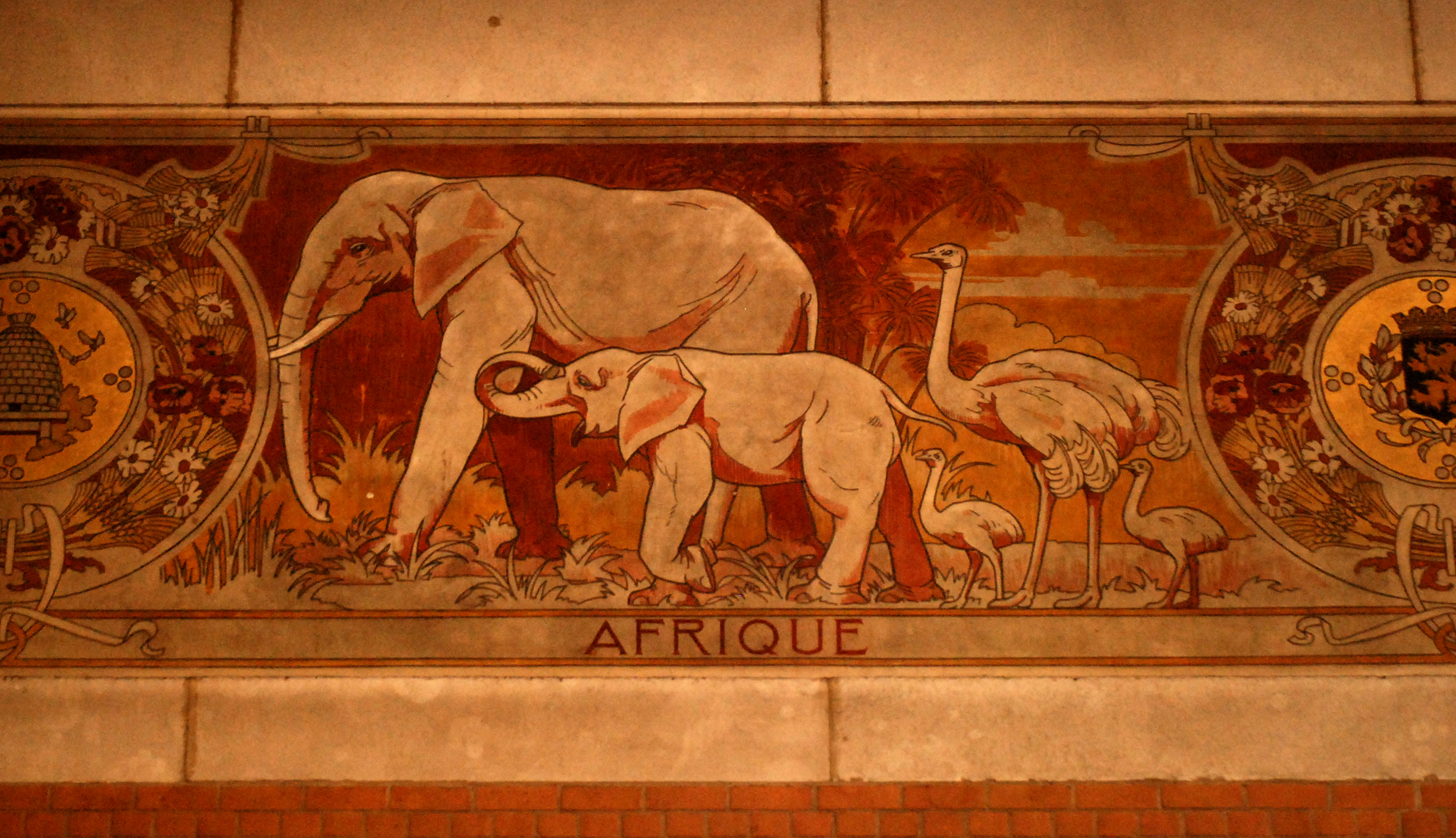 Belgique - Bruxelles - Koekelberg - Ancienne école communale des filles - sgraffite d'Adolphe Crespin (1909)